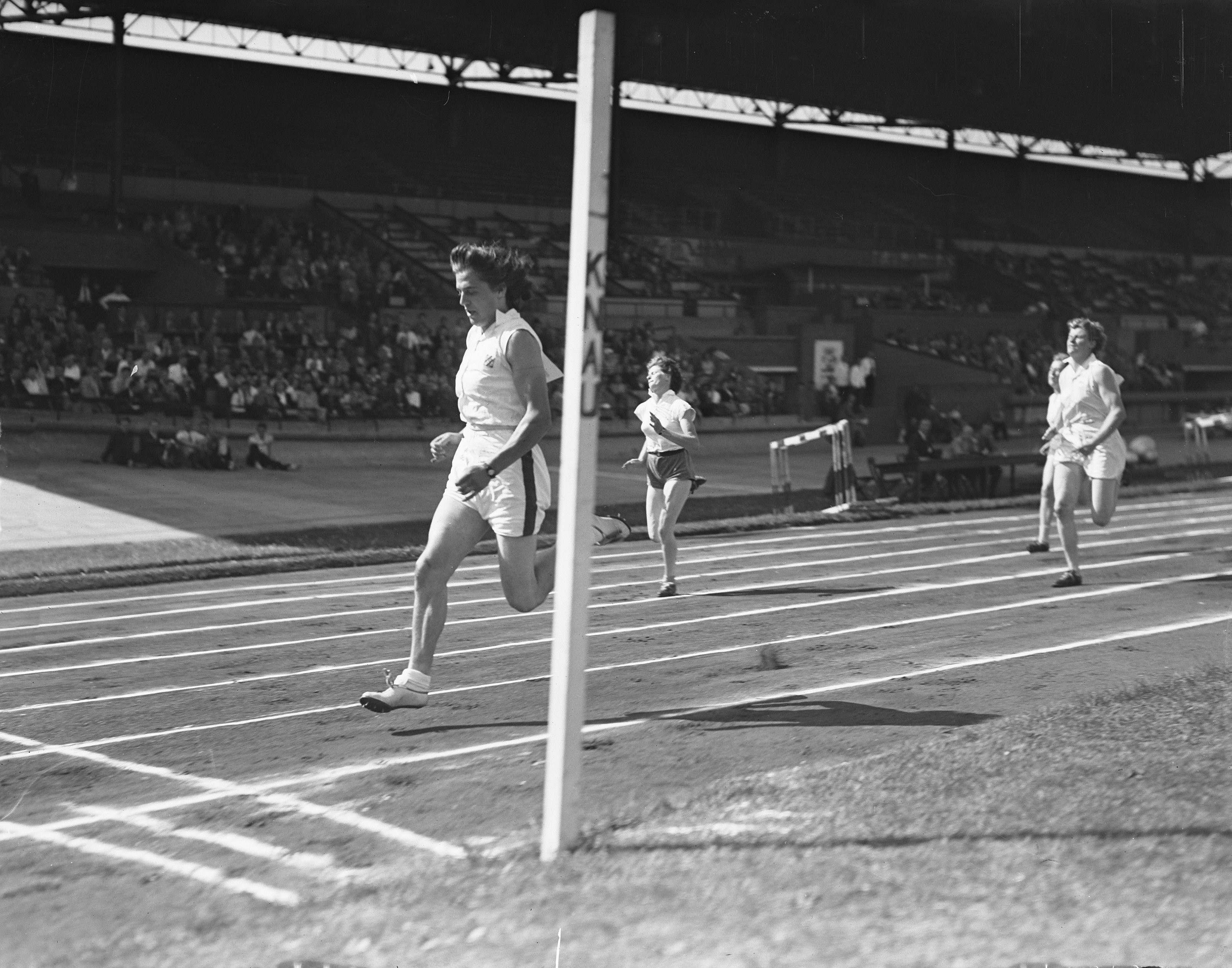 Collectie / Archief : Fotocollectie Anefo Reportage / Serie : [ onbekend ] Beschrijving : Internationaal atletiekwedstrijd in Olympisch Stadion. Foekje Dillema finish Datum : 14 augustus 1949 Locatie : Amsterdam, Noord-Holland Trefwoorden : atletiek, hardlopen, sport Persoonsnaam : Dillema Foekje Fotograaf : Noske, J.D. / Anefo Auteursrechthebbende : Nationaal Archief Materiaalsoort : Glasnegatief Nummer archiefinventaris : bekijk toegang 2.24.01.09 Bestanddeelnummer : 903-5461